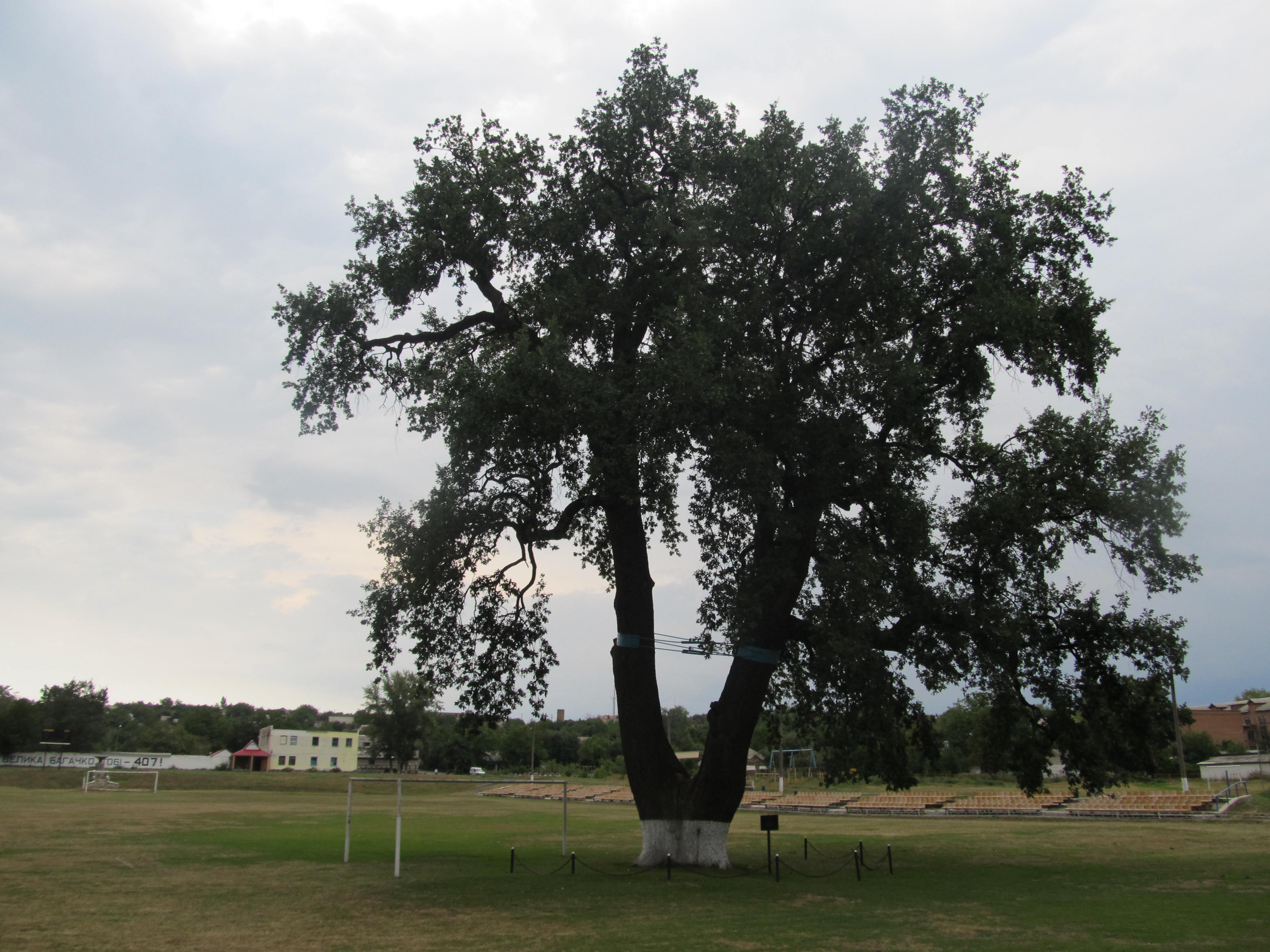 Велика Багачка, Полтавська обл.